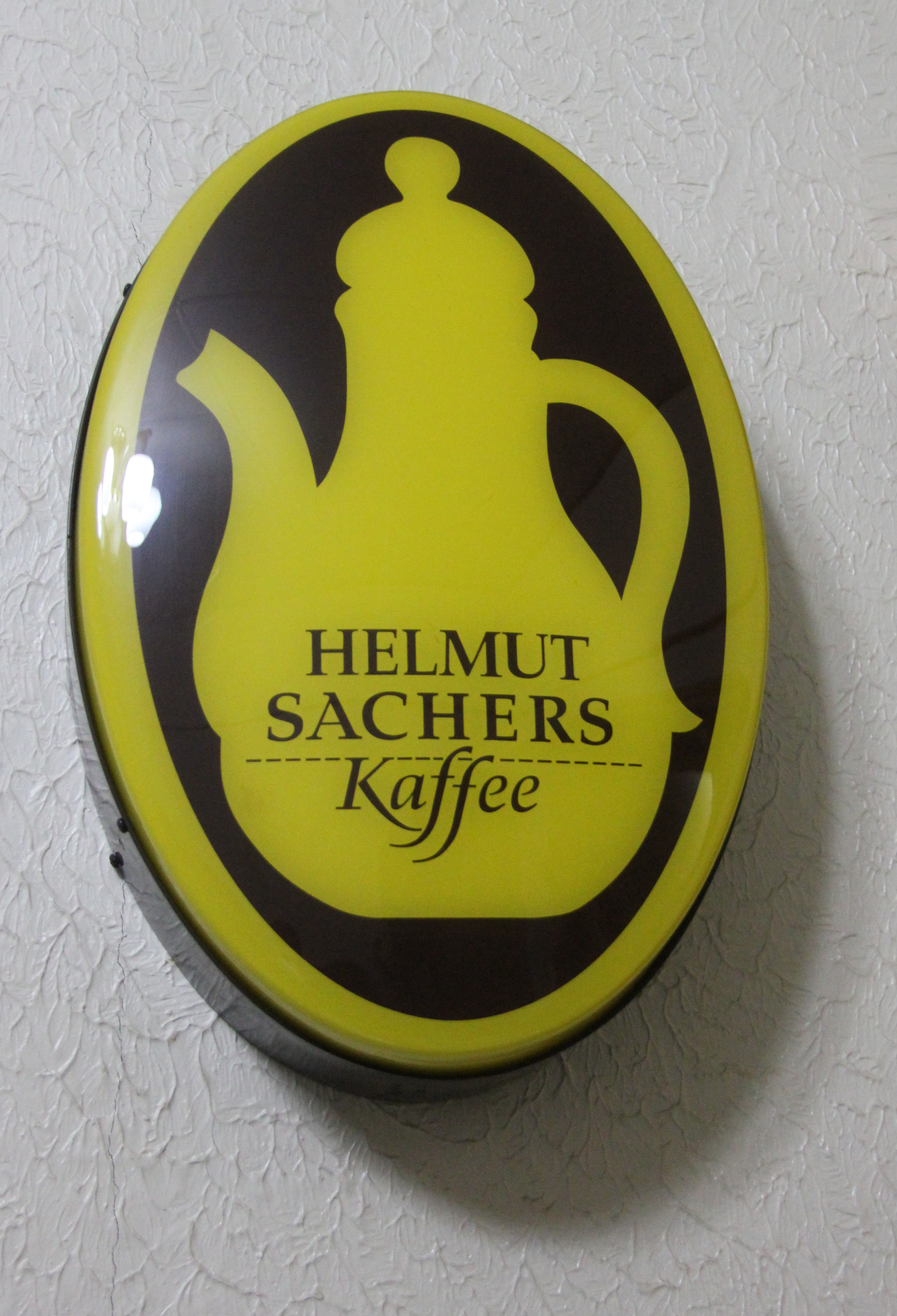 Helmut Sachers Kaffee